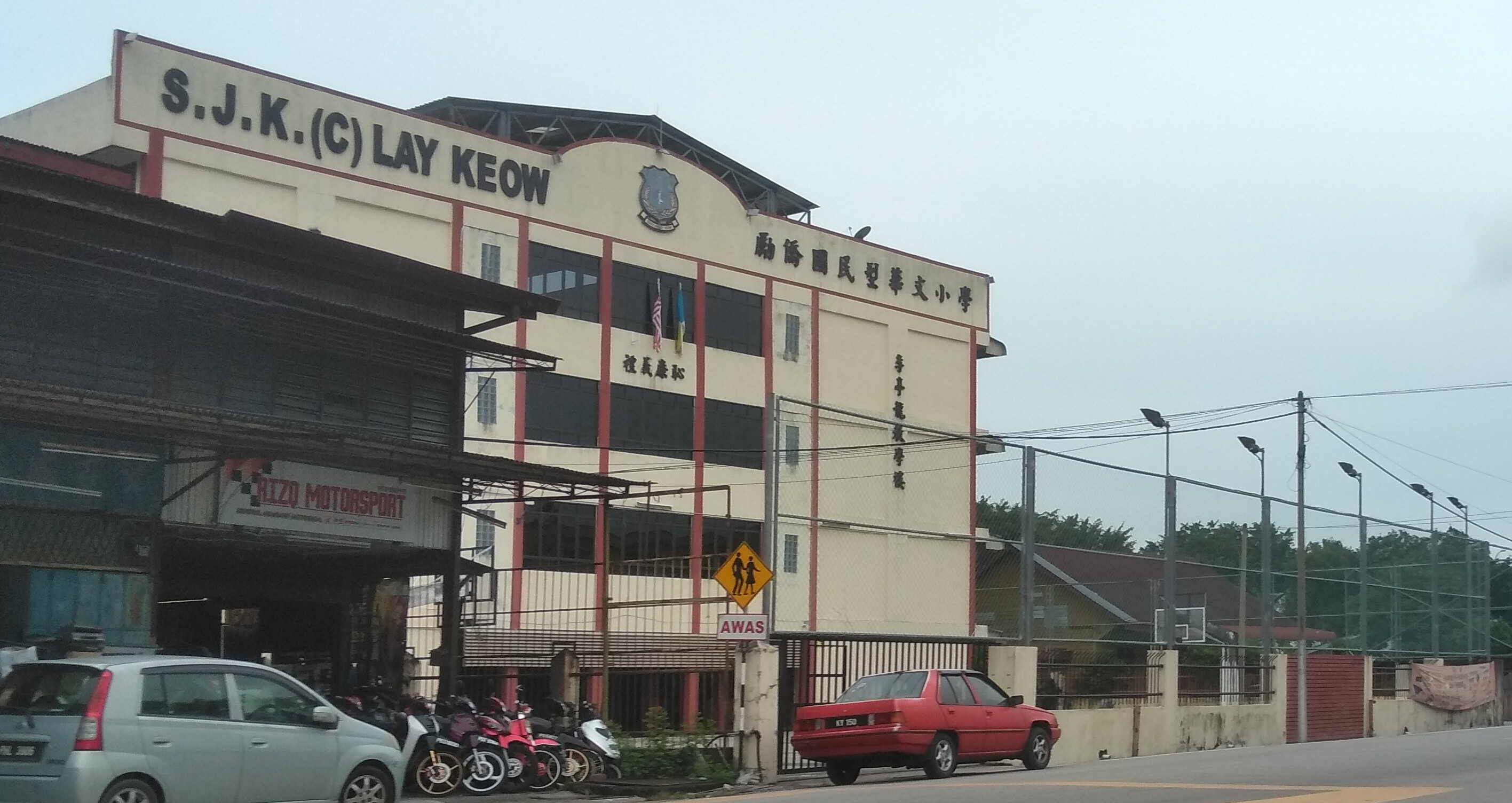 峇东埔励侨华小